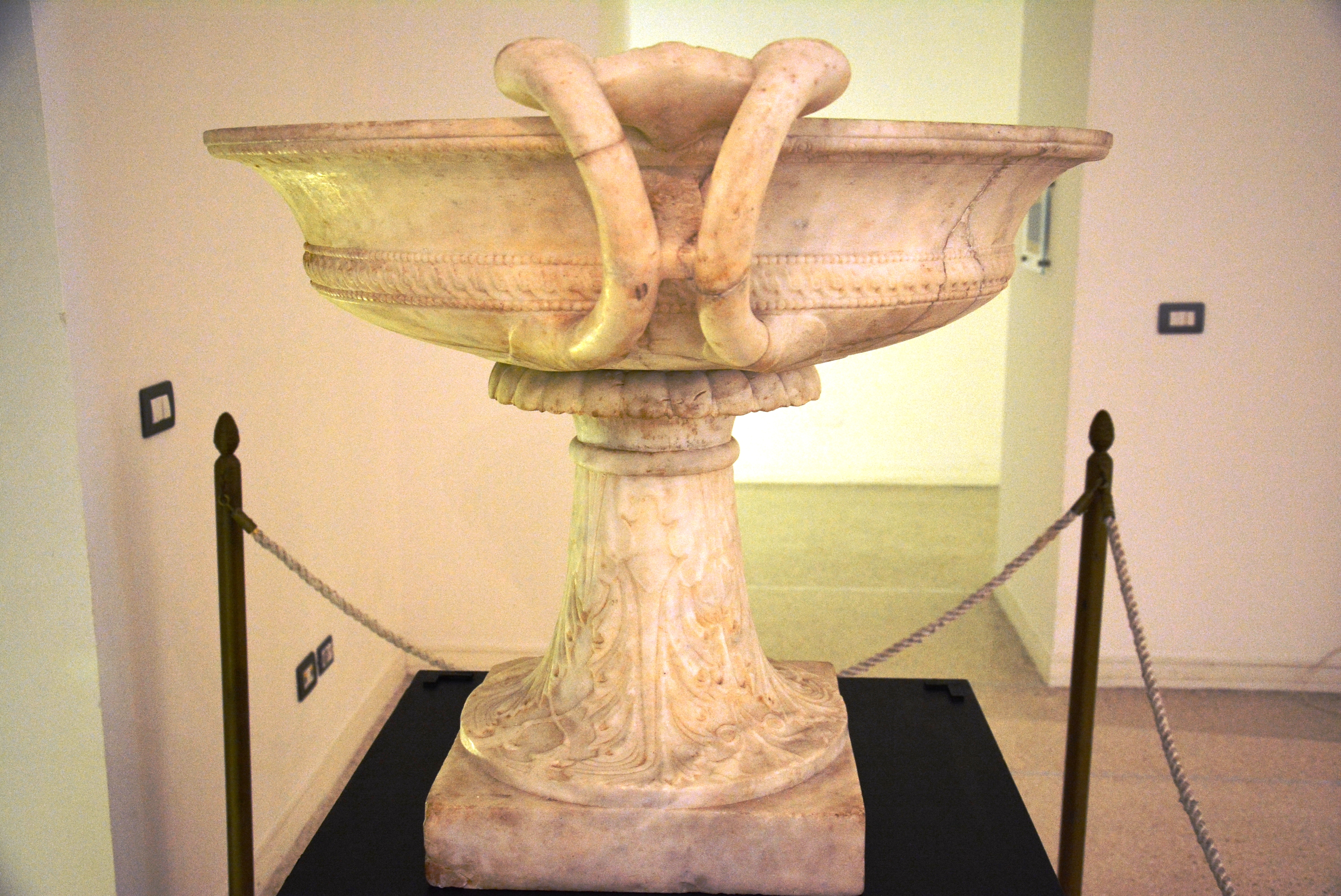 Labrum di villa del Pastore a Stabiae (Castellammare di Stabia)